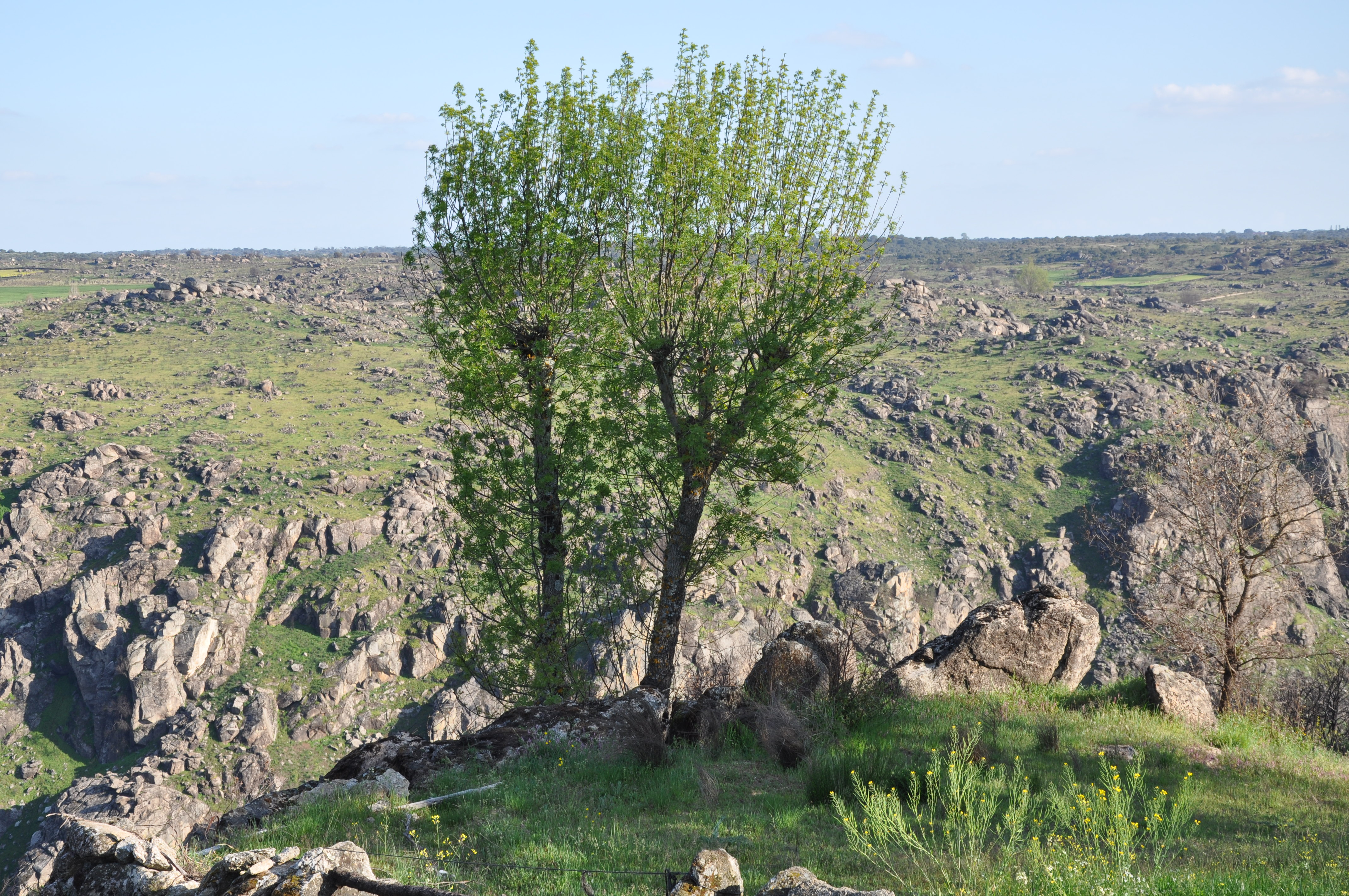 Penillanura zamorana vista desde el planalto mirandés al otro lado del río Duero. Y dos fresnos. Aldeia Nova, Miranda do Douro, Portugal.